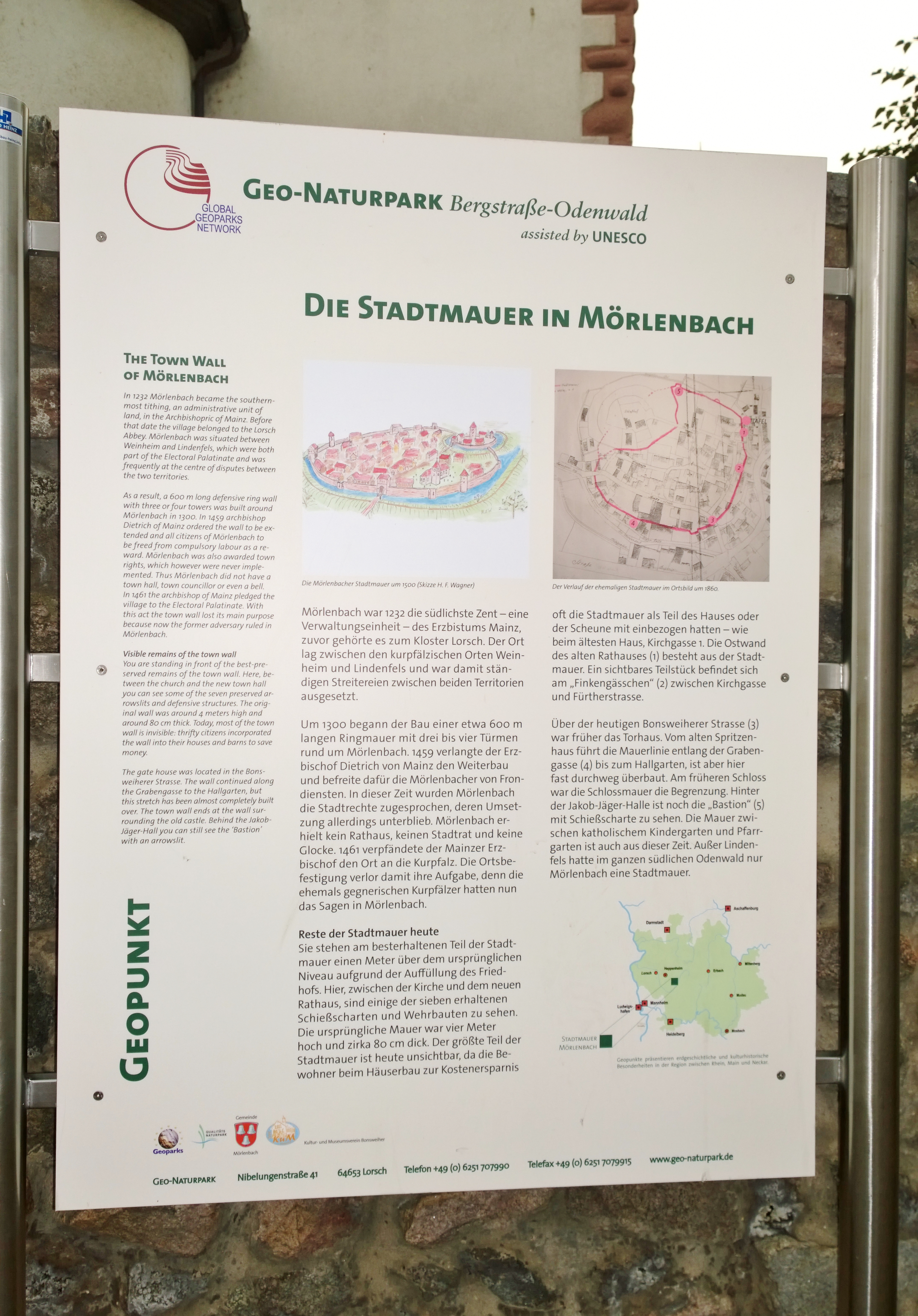 Informationstafel zur Stadtmauer und Geschichte der Stadt Mörlenbach